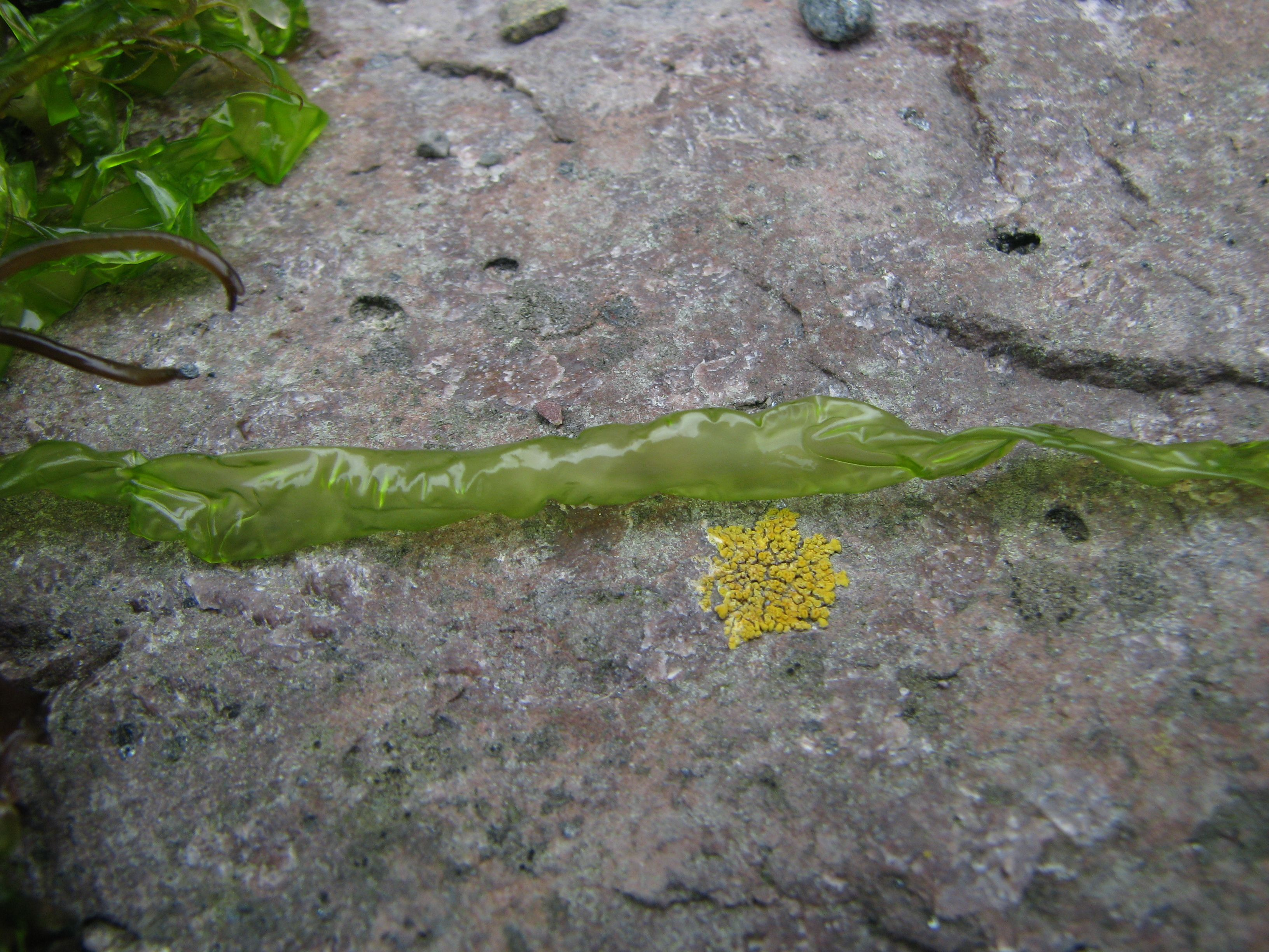 Tarmgrønske Ulva intestinalis består av to cellelag med hulrom mellom